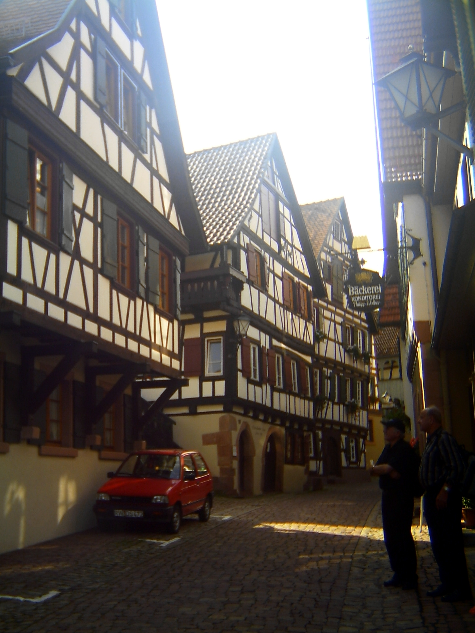 Schiltach, Schenkenzeller Street